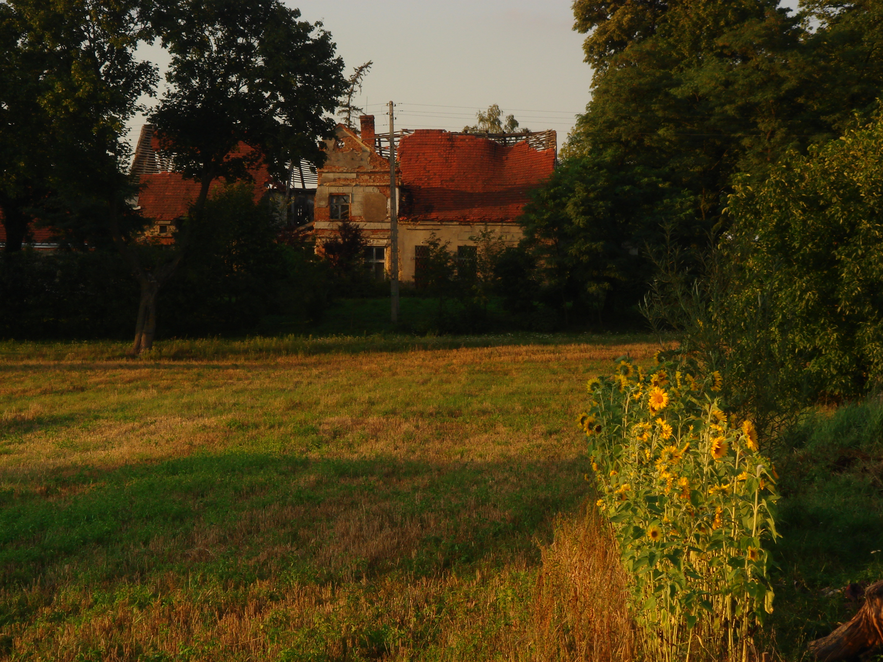 Nie istniejący Pałac we Wierzbowie